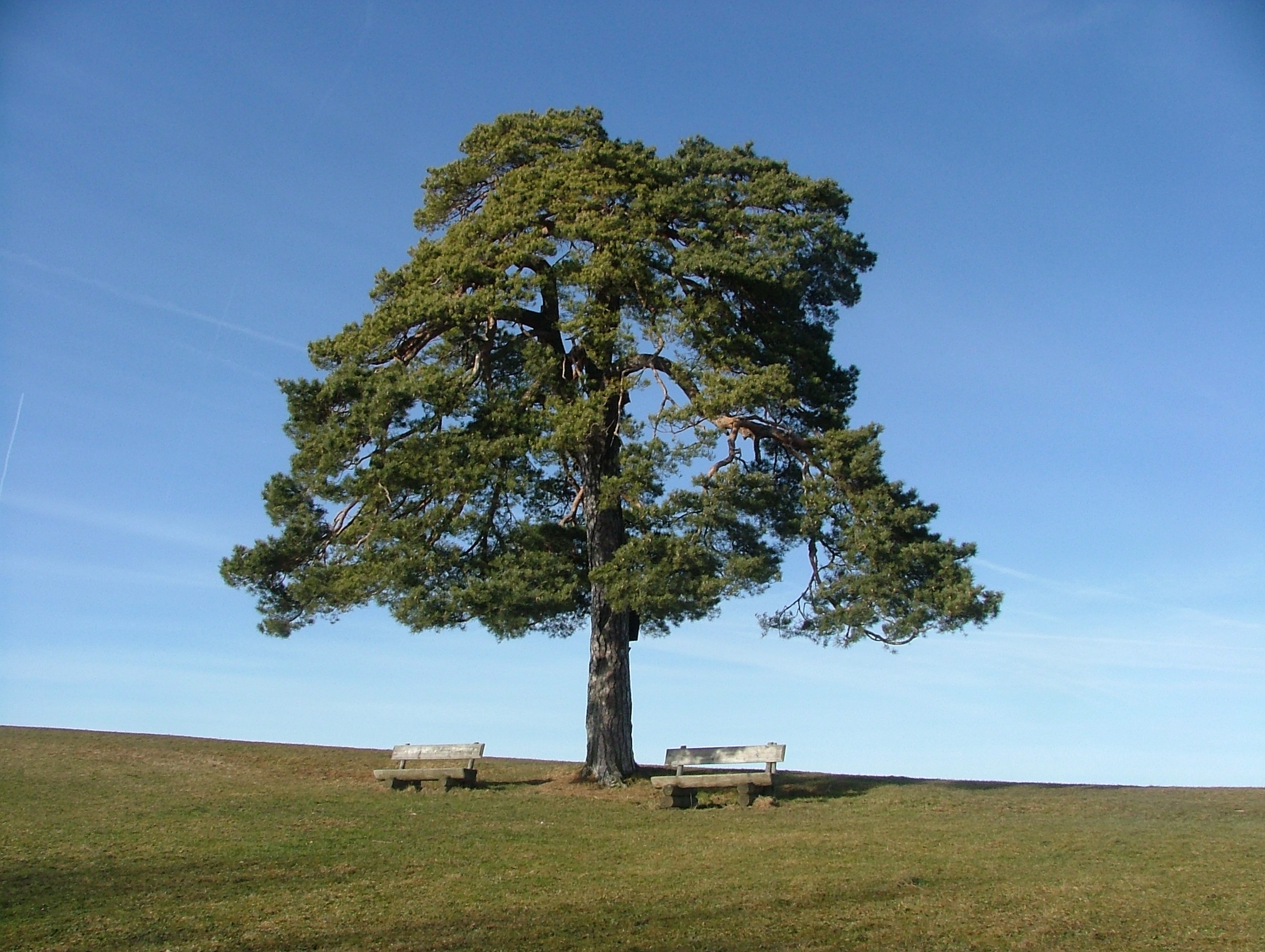 Mulzerföhre auf dem Mariaberg